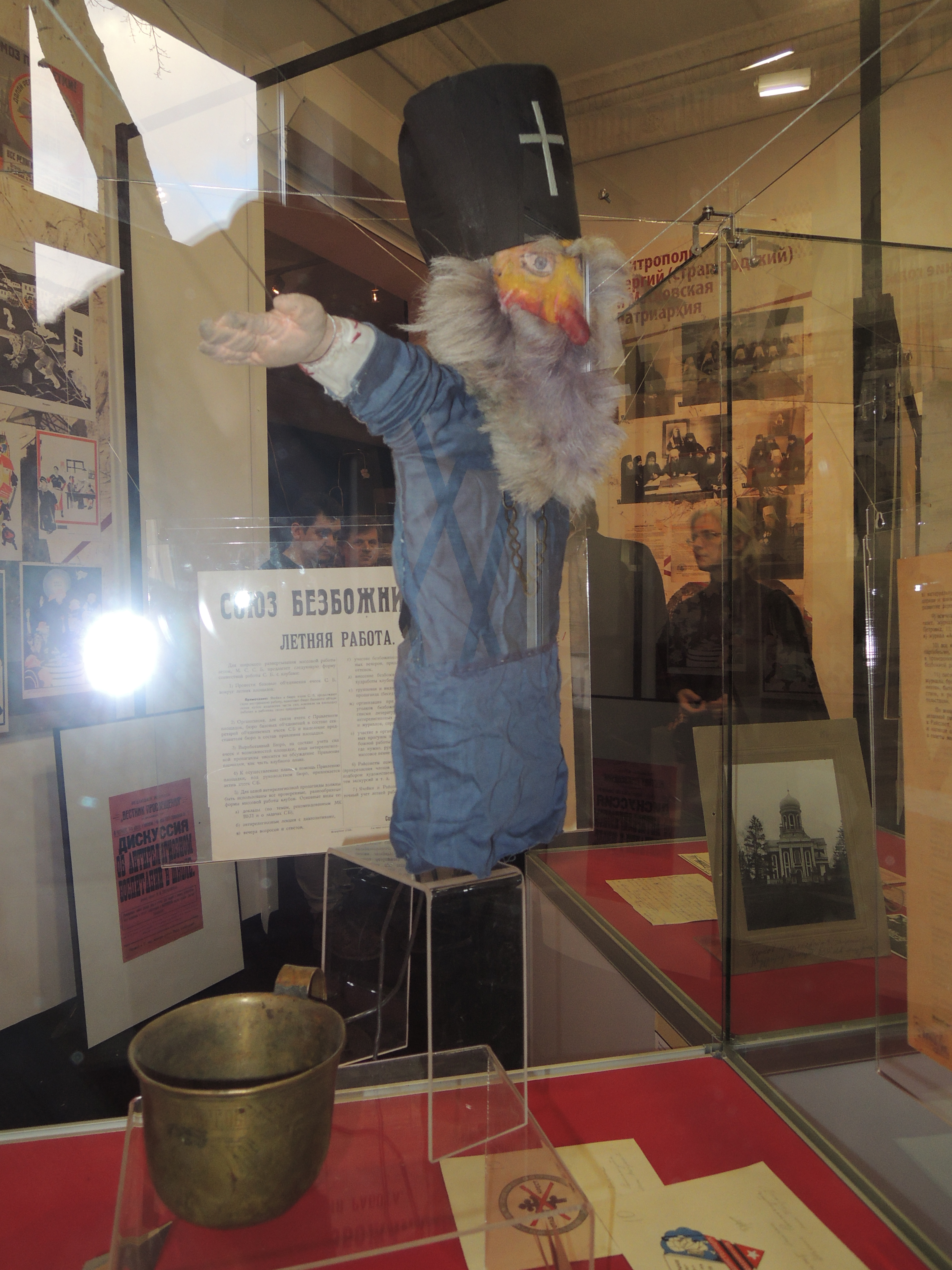 Выставка «Преодоление: Русская Церковь и Советская власть» в Государственном центральном музее современной истории России в Москве, 2012